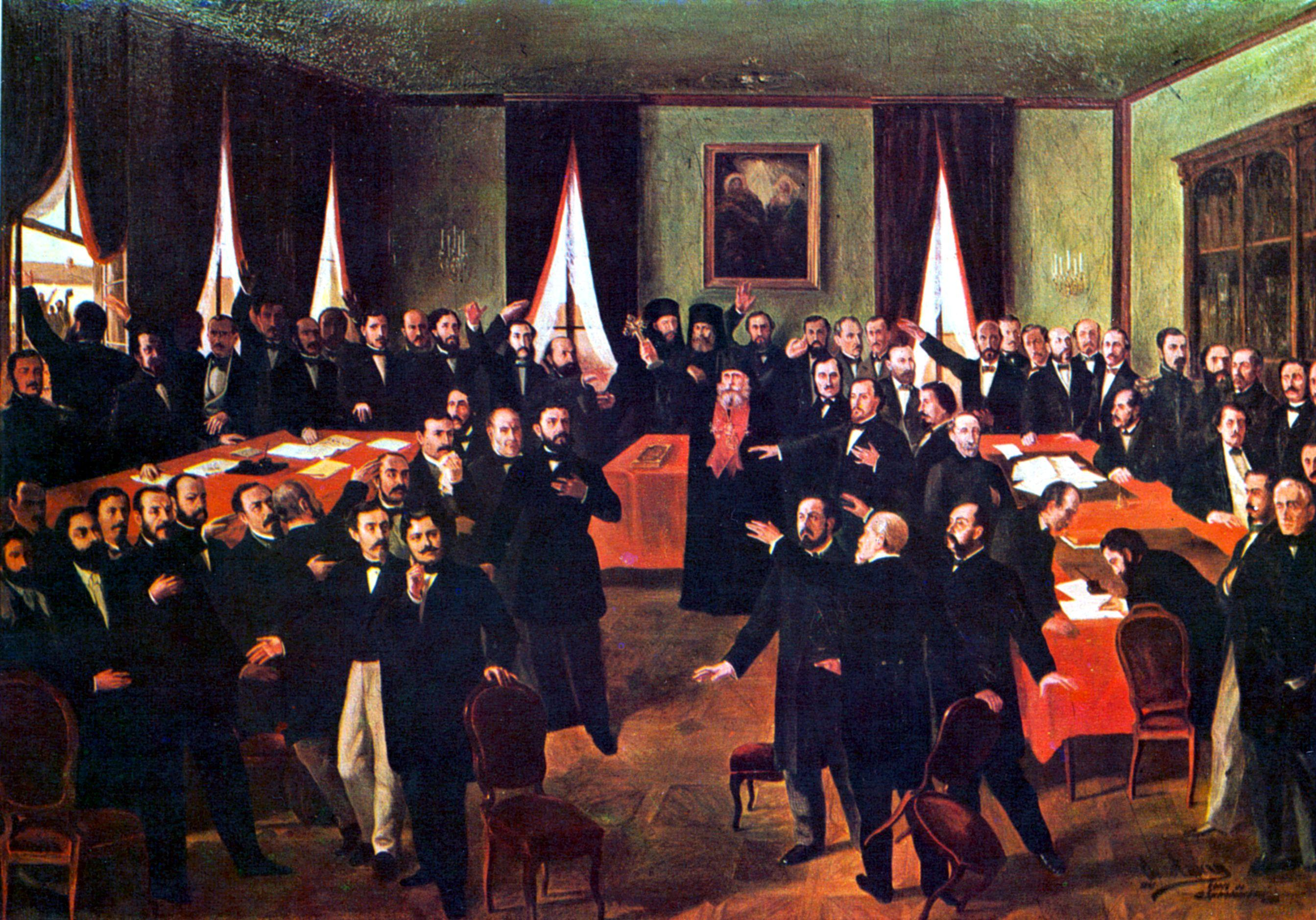 Proclamarea Unirii; Muzeul Naţional de Istorie a României